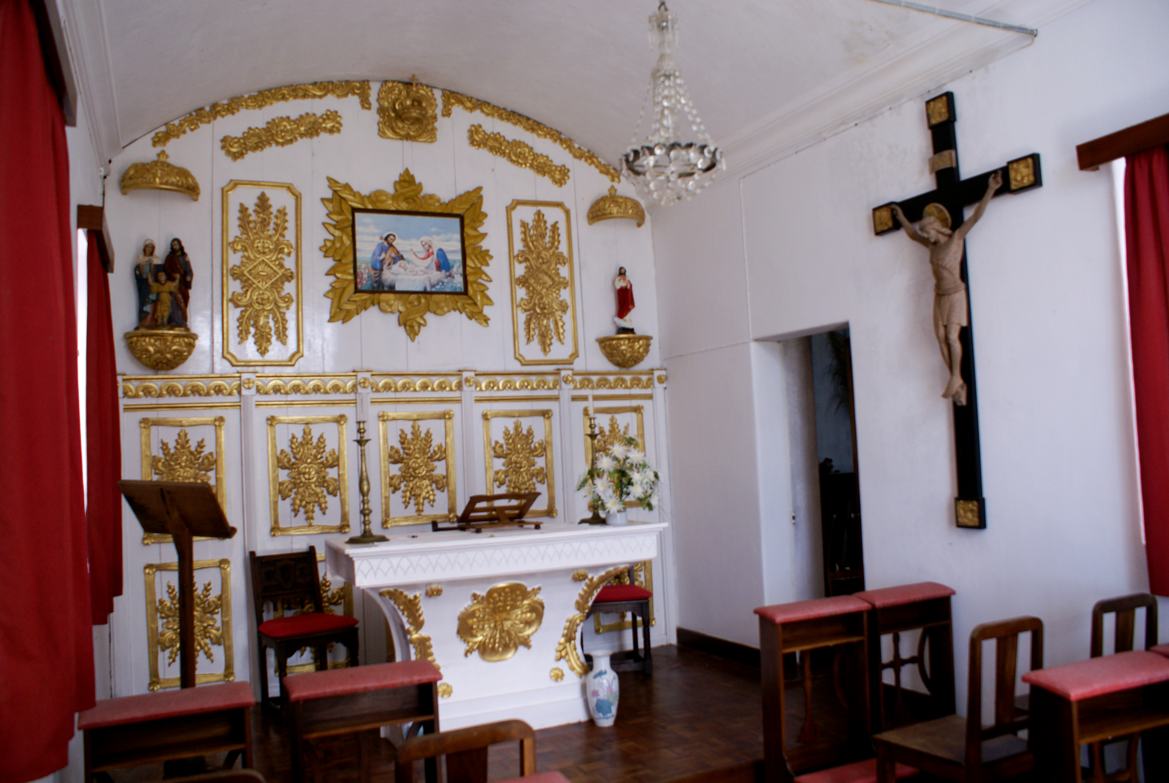 Capela da Sagrada Família, altar-mor, Velas, ilha de São Jorge, Açores